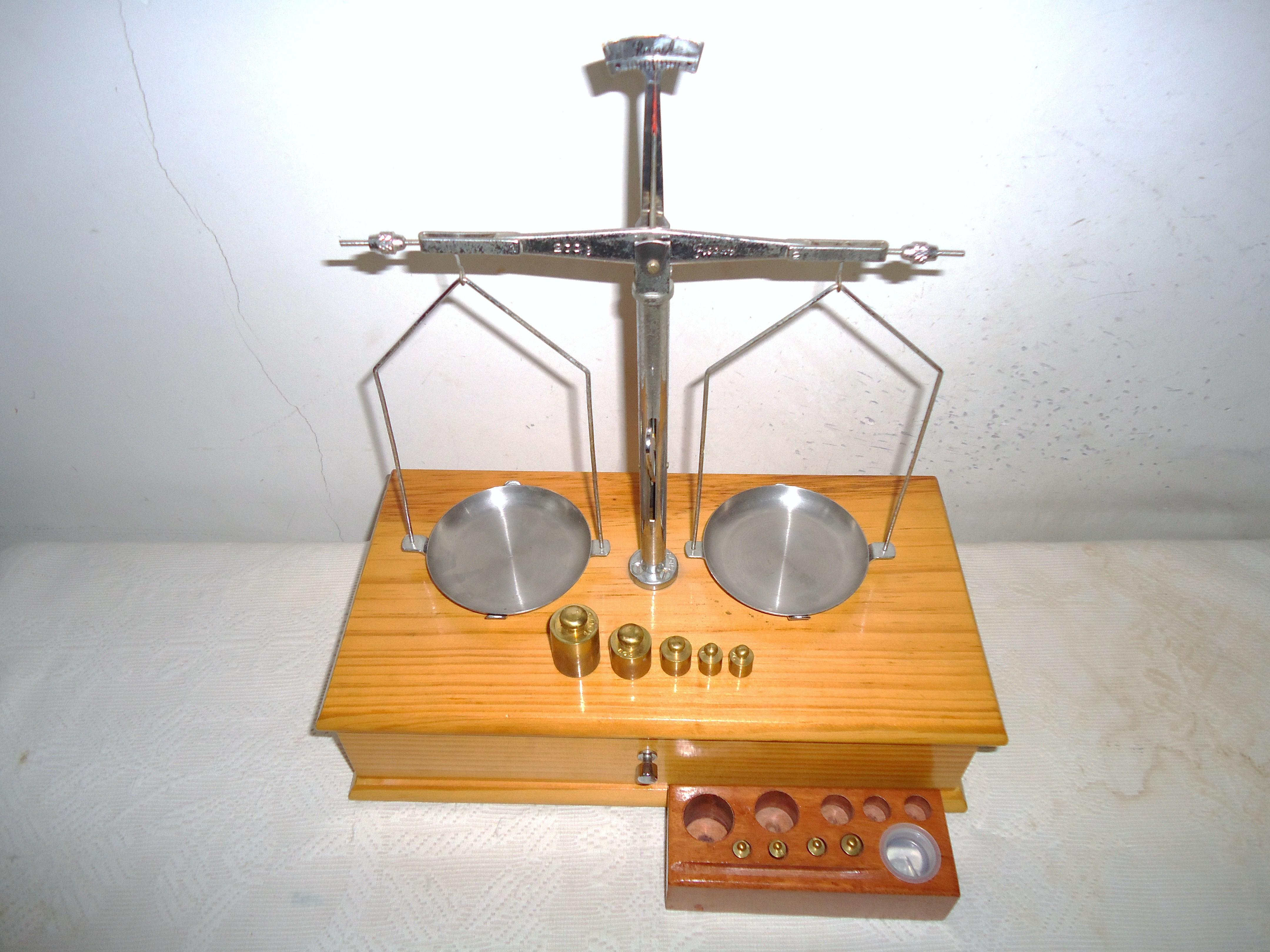 Balança com capacidade de até 200 gramas.